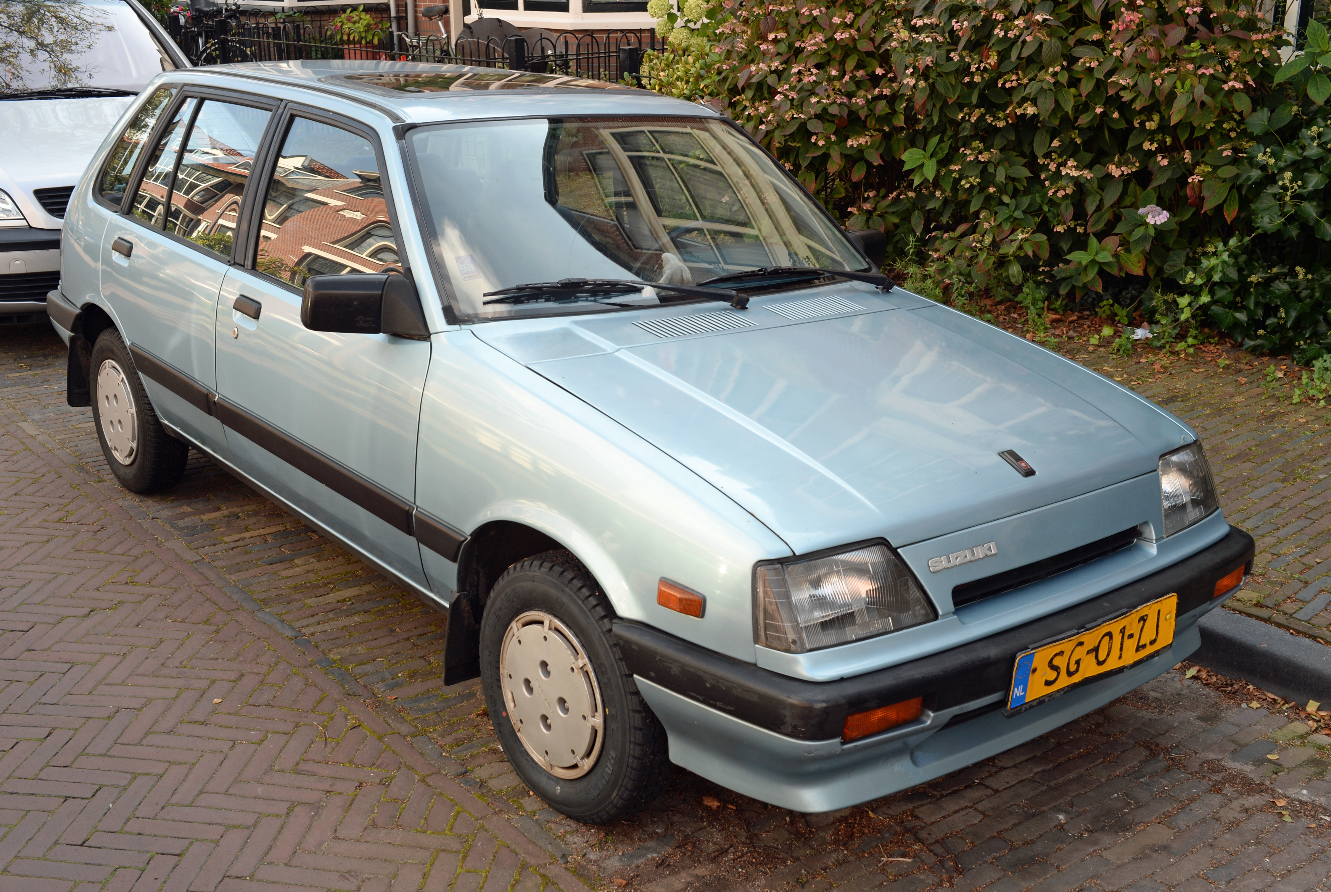 1987 Suzuki Swift 1.3 GLX Automatic